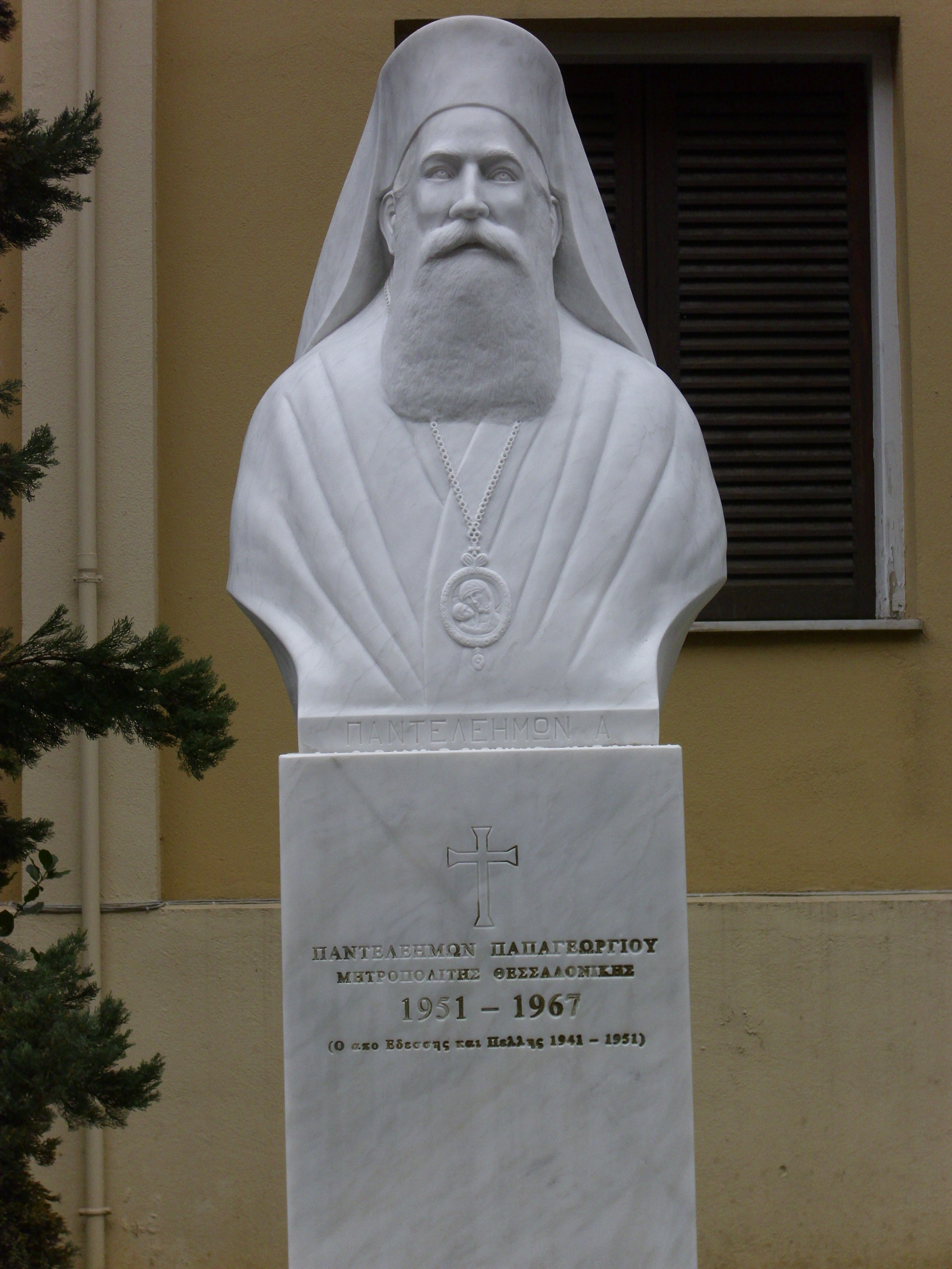 Статуя на солунския митрополит Пантелеймон Папагеоргиу в Солун.